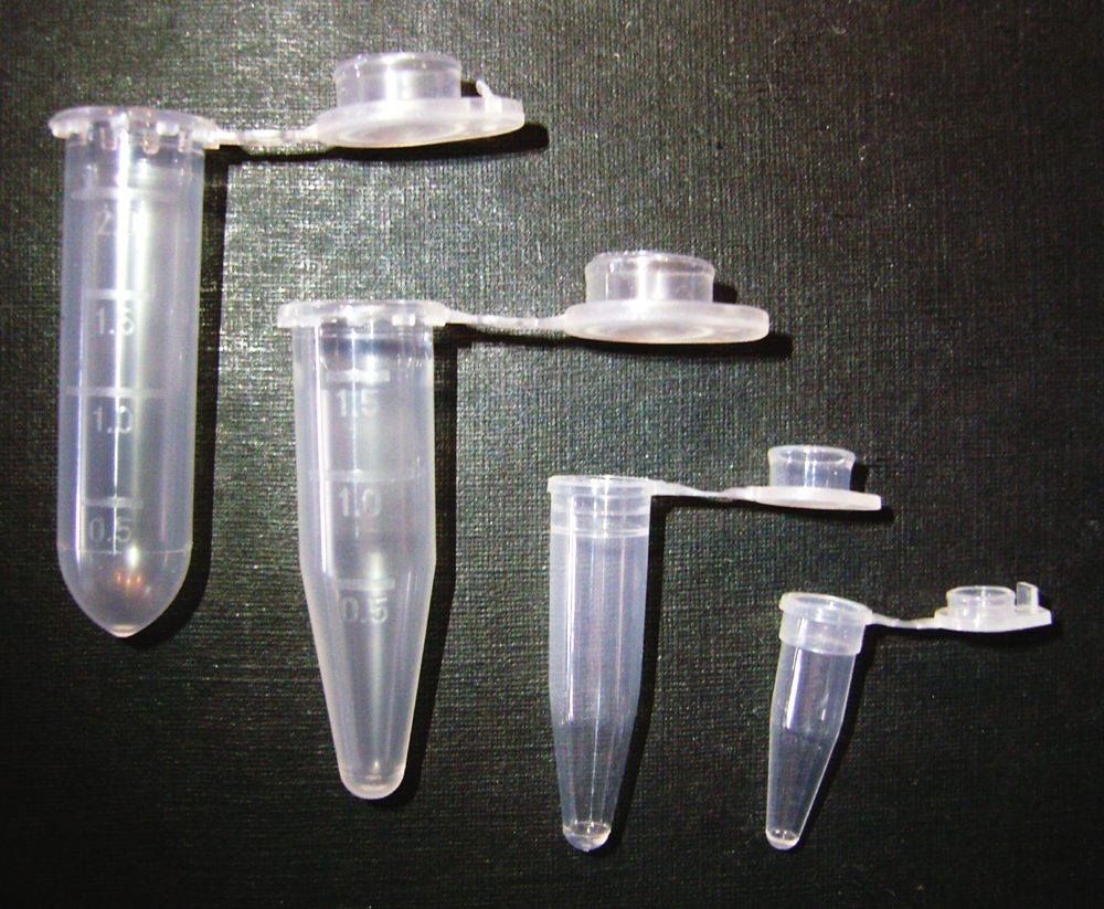 Eppendorfcups in verschiedenen Größen